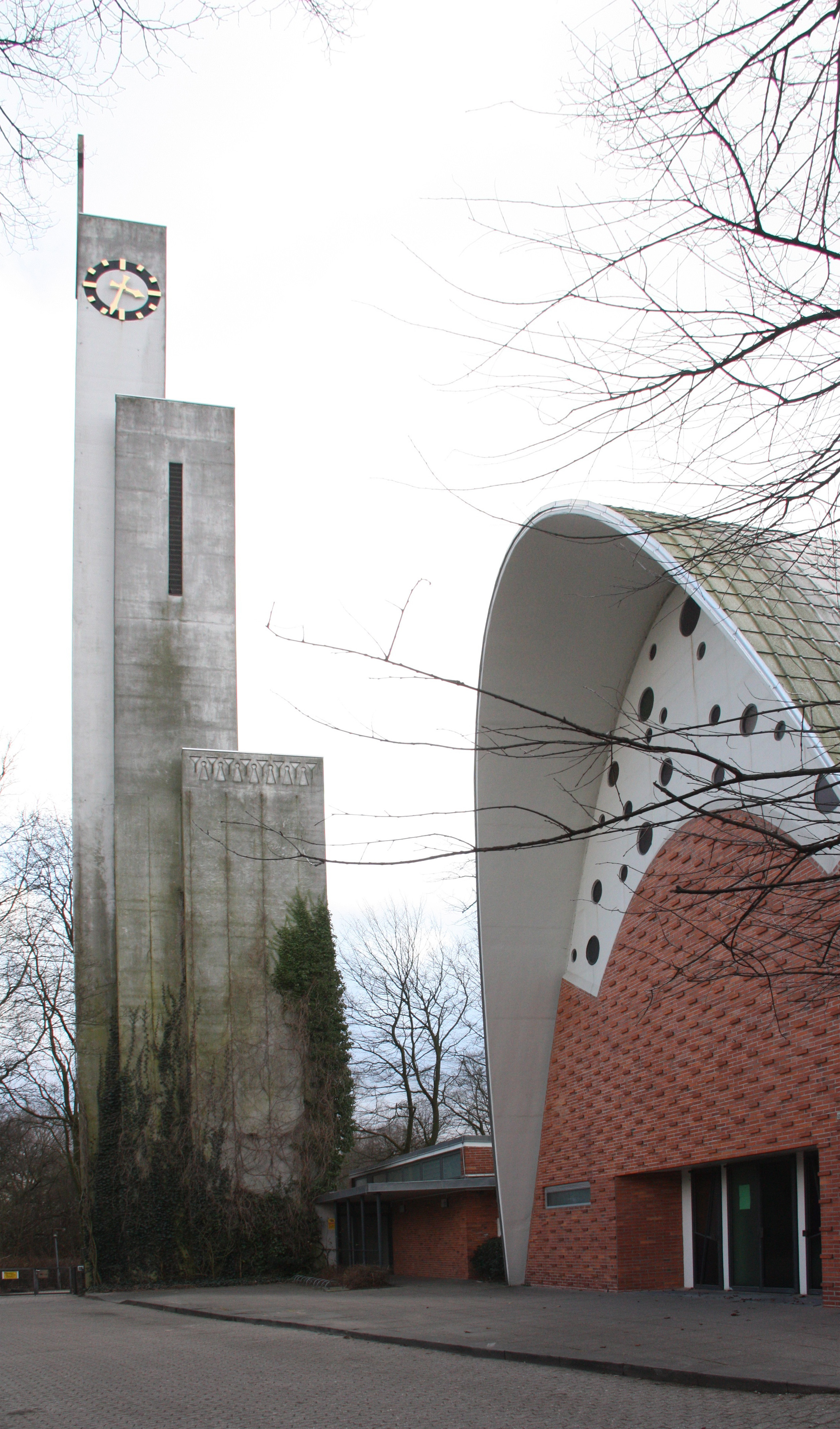 Hamburg, Farmsen, Erlöserkirche, Turm und Eingang